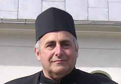 Preotul Mircea Suciu (foto Oblio)